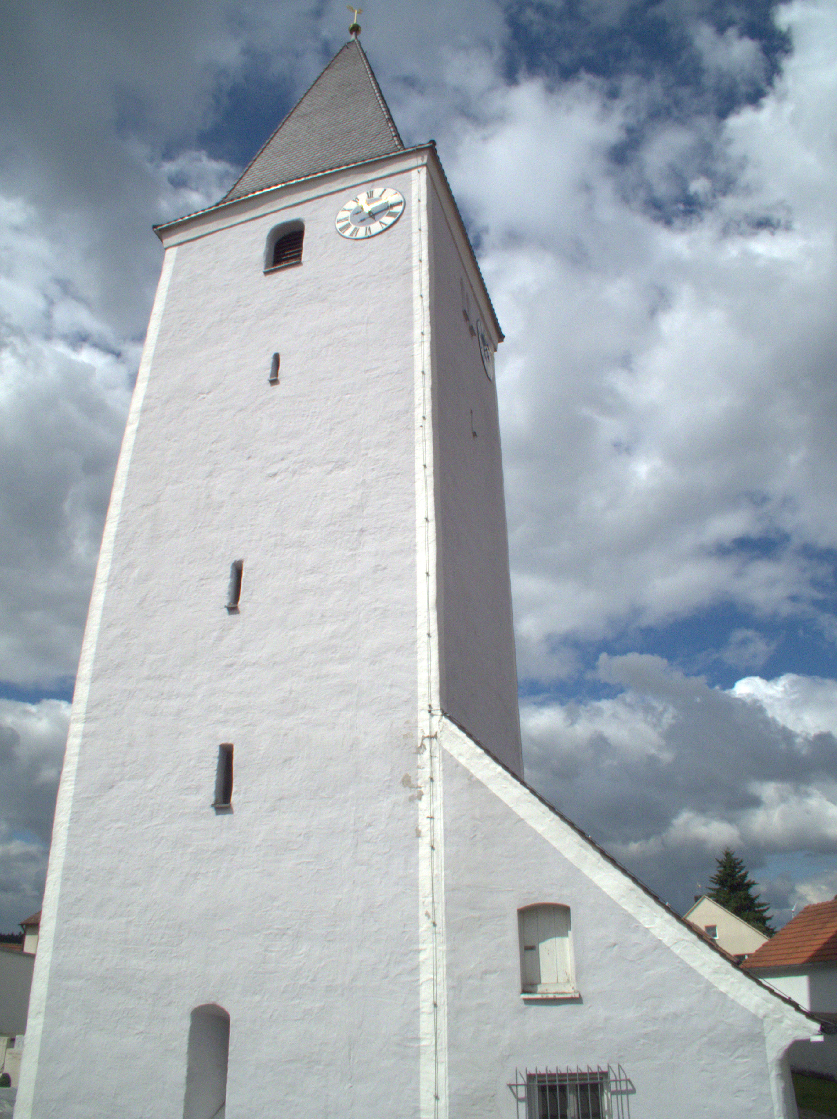 Die katholische Filialkirche St. Martin in Leutenbach, Gemeinde Deining in der Oberpfalz: Turm